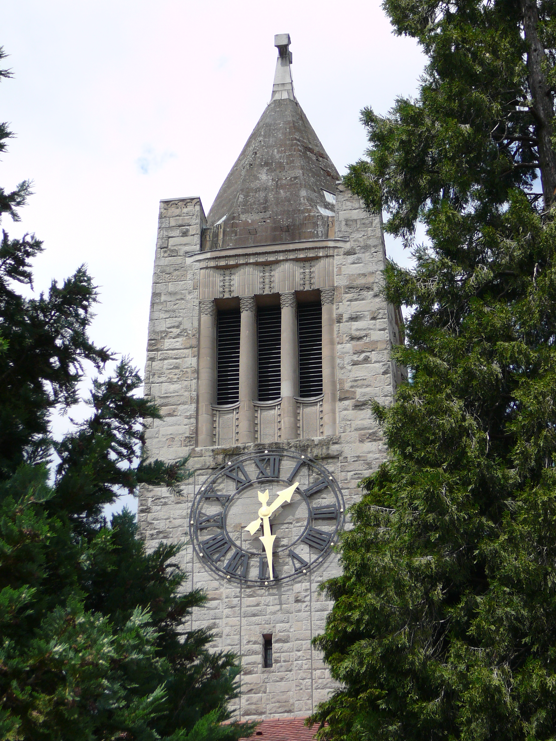 Römisch-katholische Kirche St. Anton Zürich-Hottingen, Kirchturm